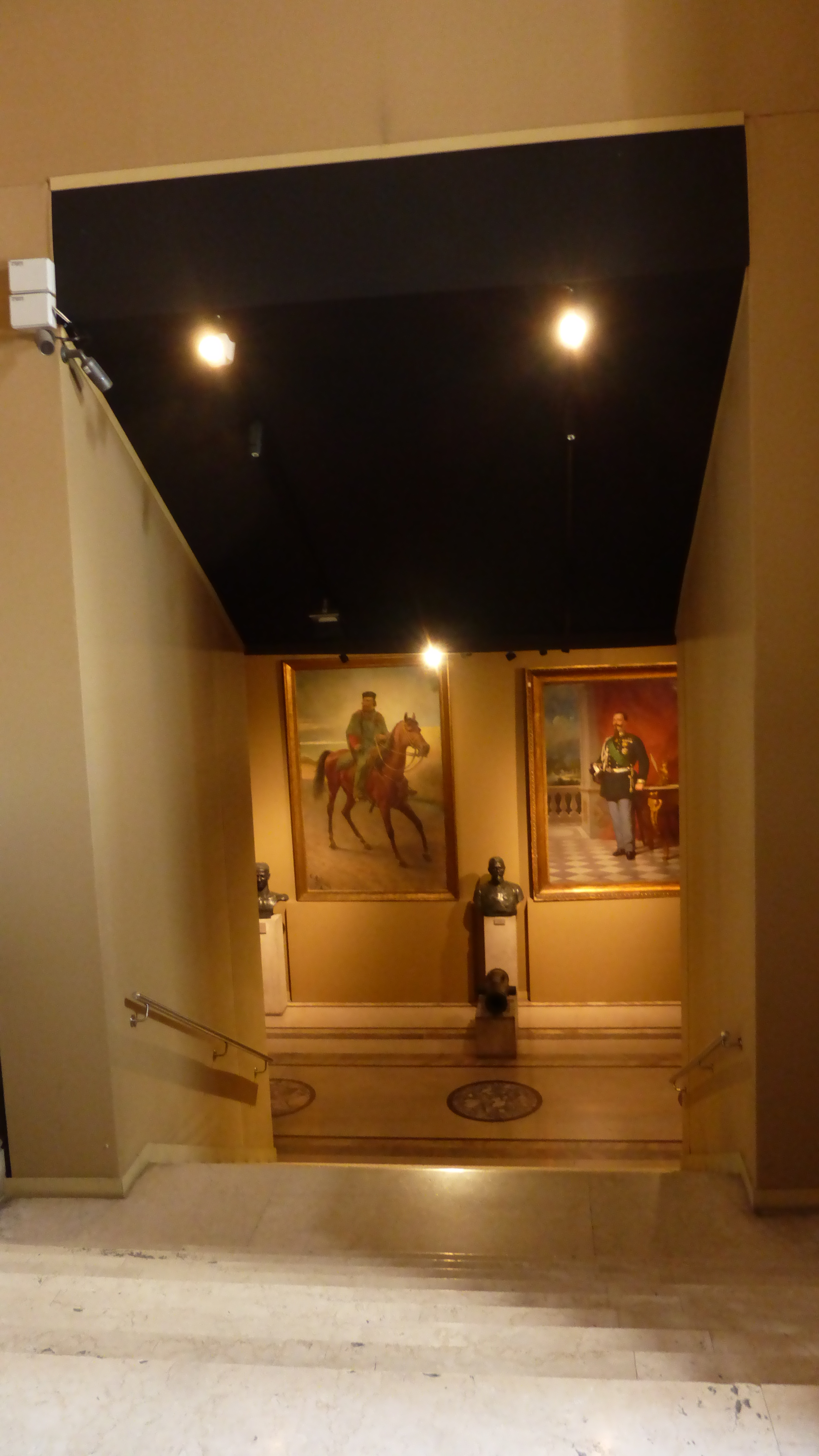 Roma, Museo centrale del Risorgimento. see filename.